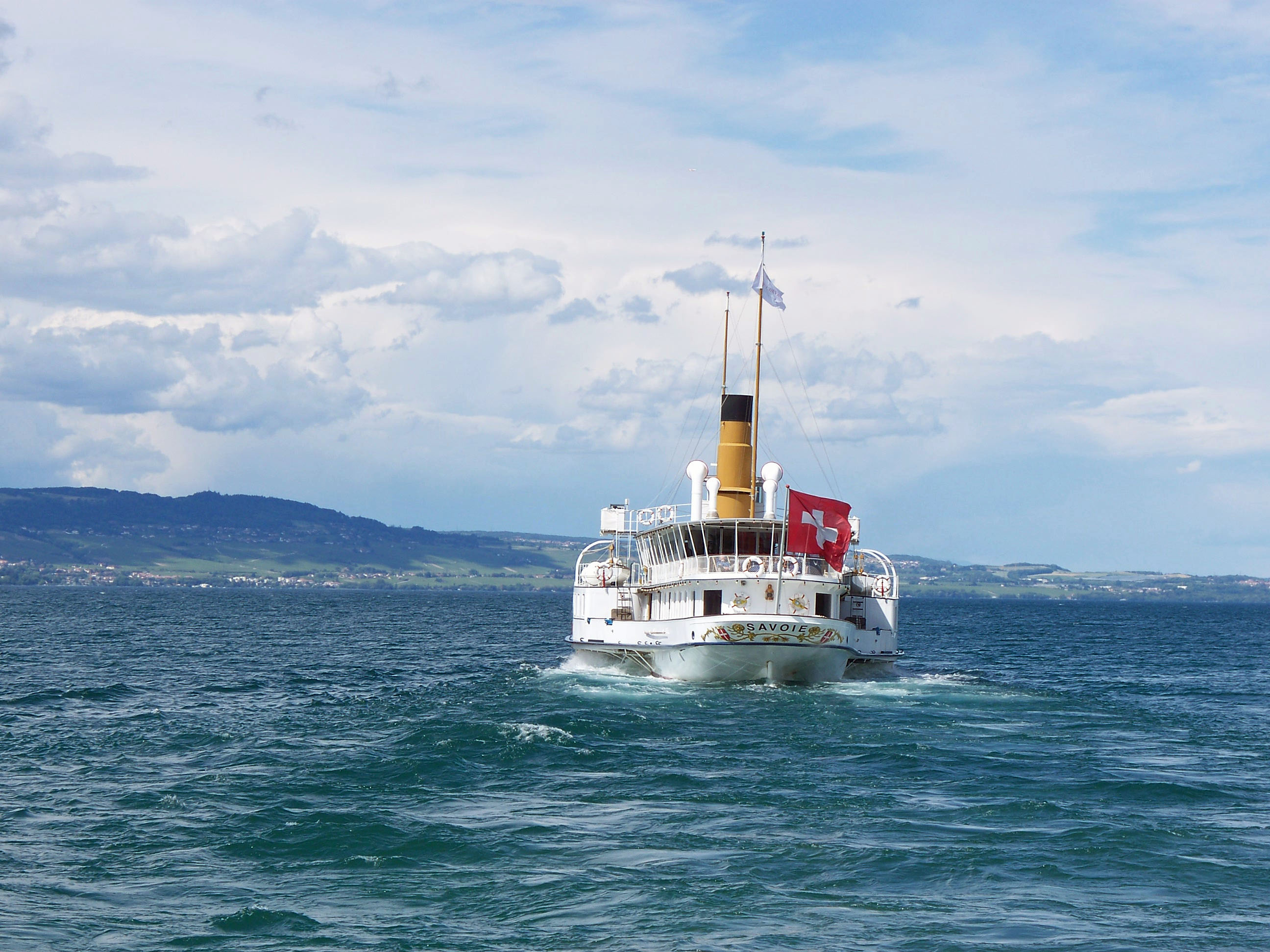 Le lac Léman à Nernier